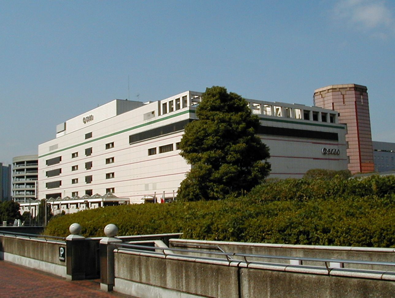 多摩そごう外観